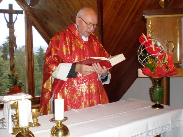 fotografii vyfotila Mgr. Veronika Čepelková v průběhu exercicií v Marianu v Janských Lázních